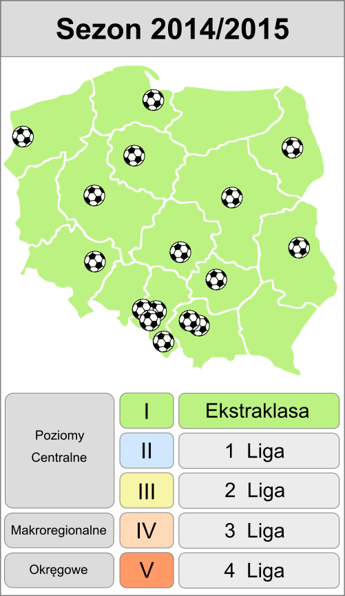 Jagiellonia w sezonie 2014/2015 - mapa